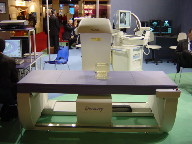 Photographie d'un ostéodensitomètre. Photo pris au CNIT de La Défense à l'occasion des JFR. Auteur et Date : Raziel {boudoir} 24 octobre 2006 à 21:14 (CEST)